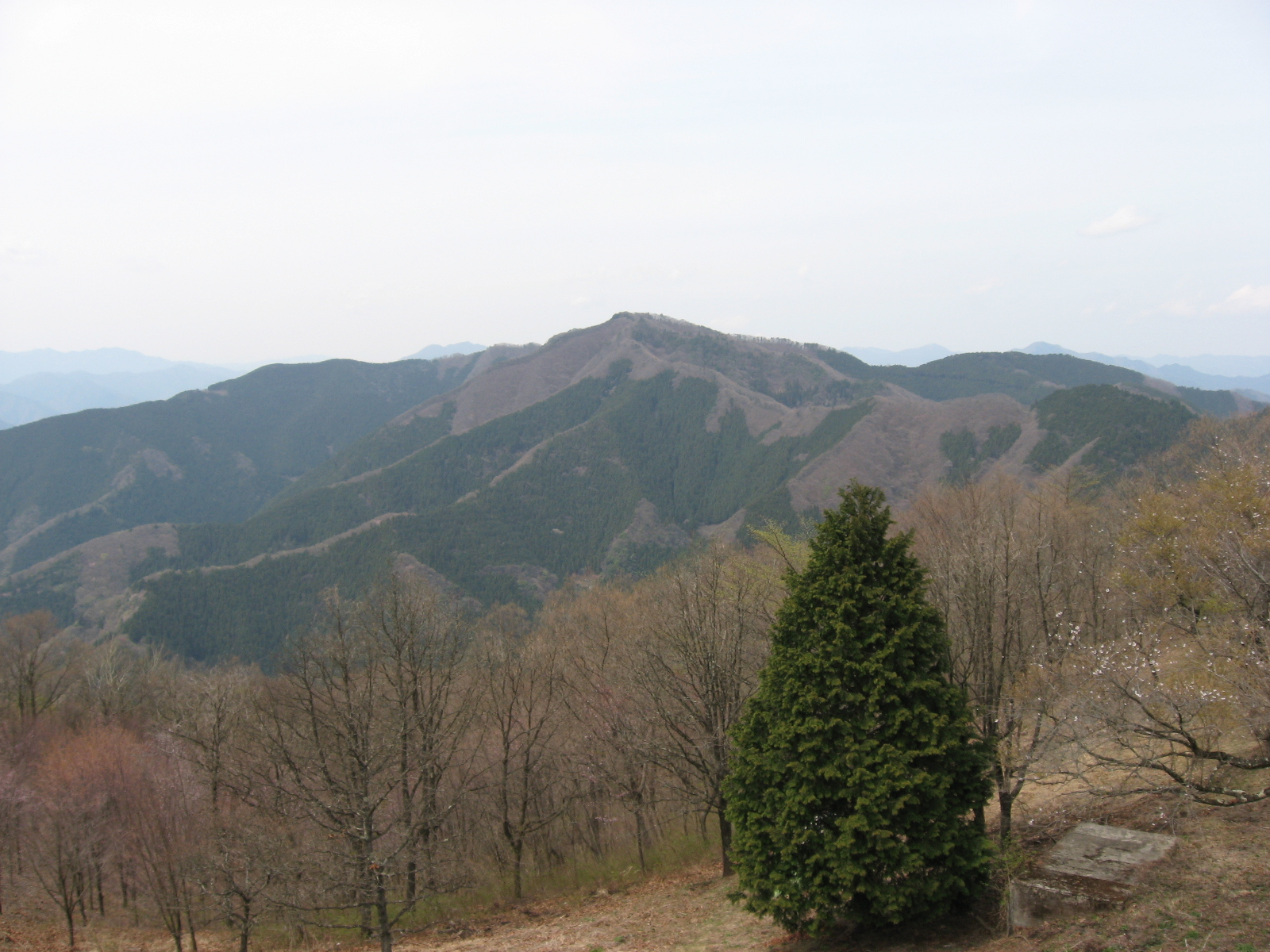 陣馬山より連行峰